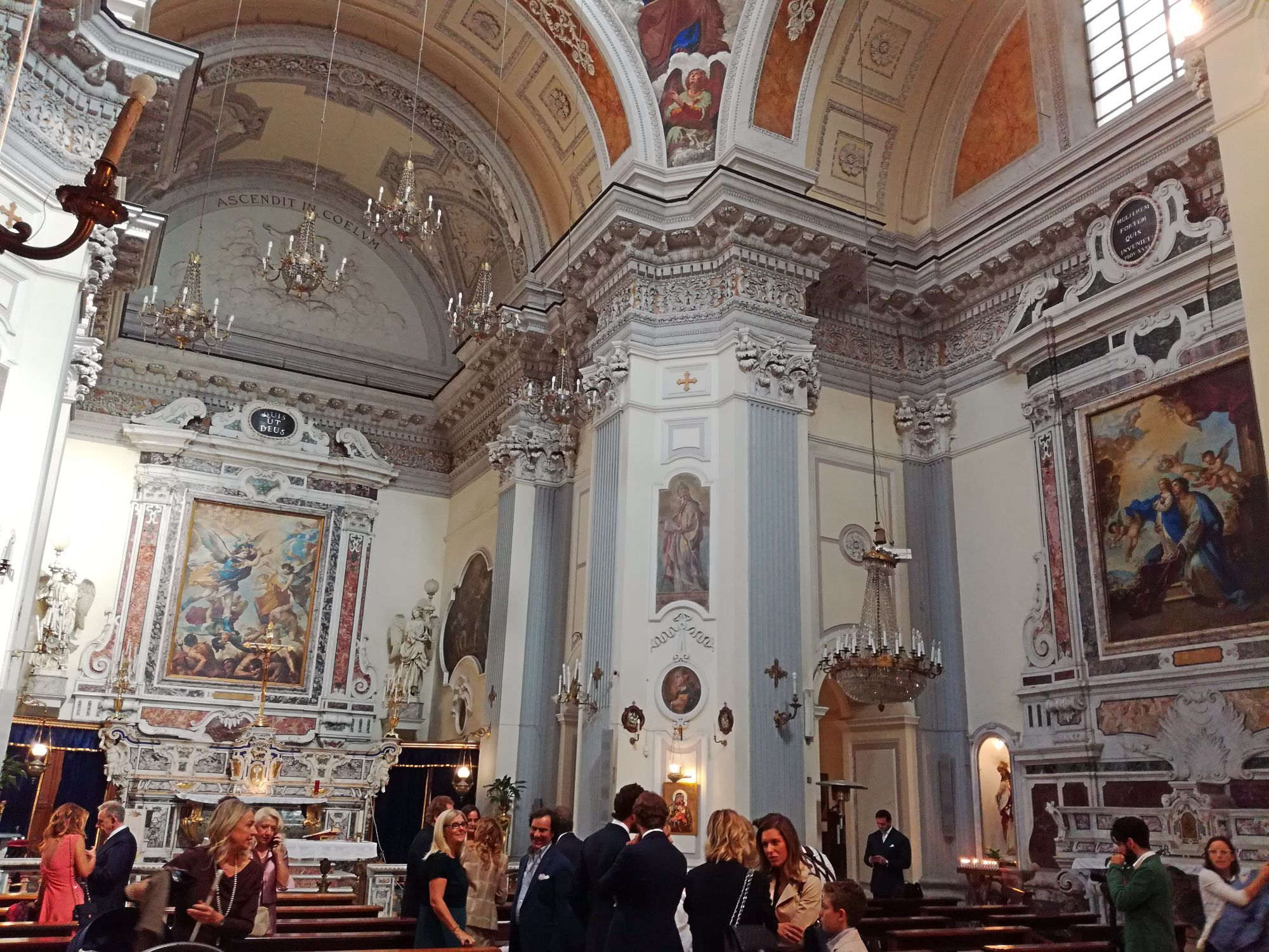 Interno Ascensione a Chiaia, Napoli